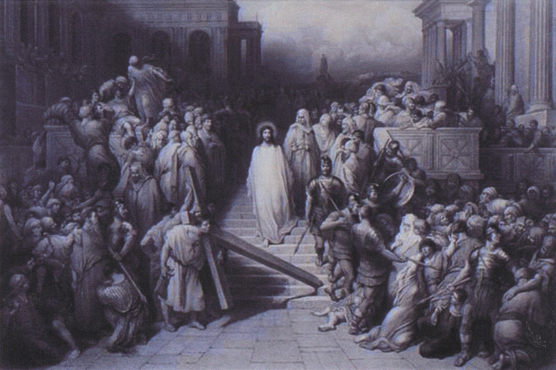 Eau-forte sur papier, reproduction (66 x 90,5 cm) du tableau de Gustave Doré Le Christ quittant le prétoire, gravée par Herbert Bourne, publiée à Londres par Fairless & Beeforth.